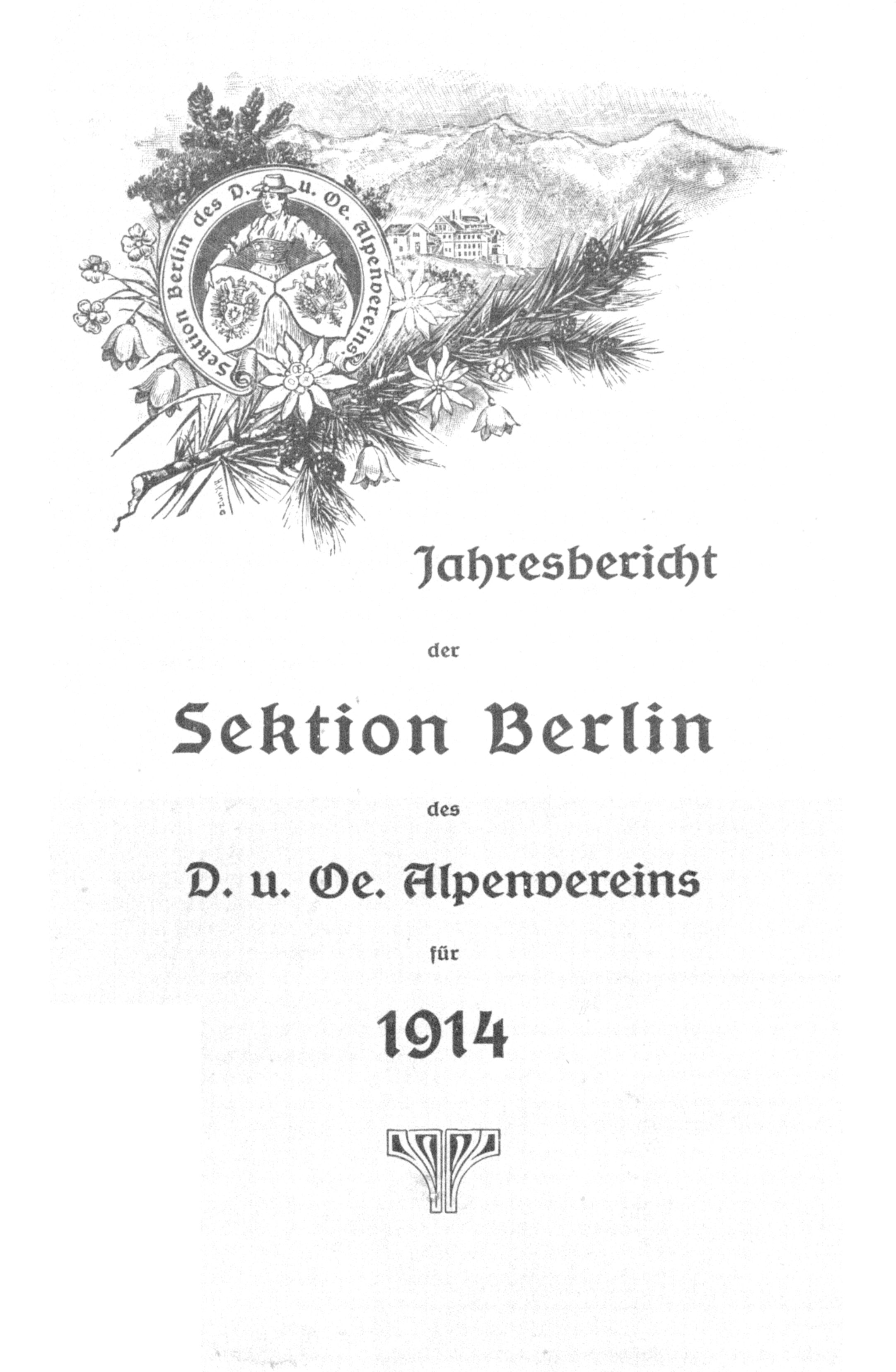 Titelblatt des Jahresberichtes der Sektion Berlin des DOeAV von 1914